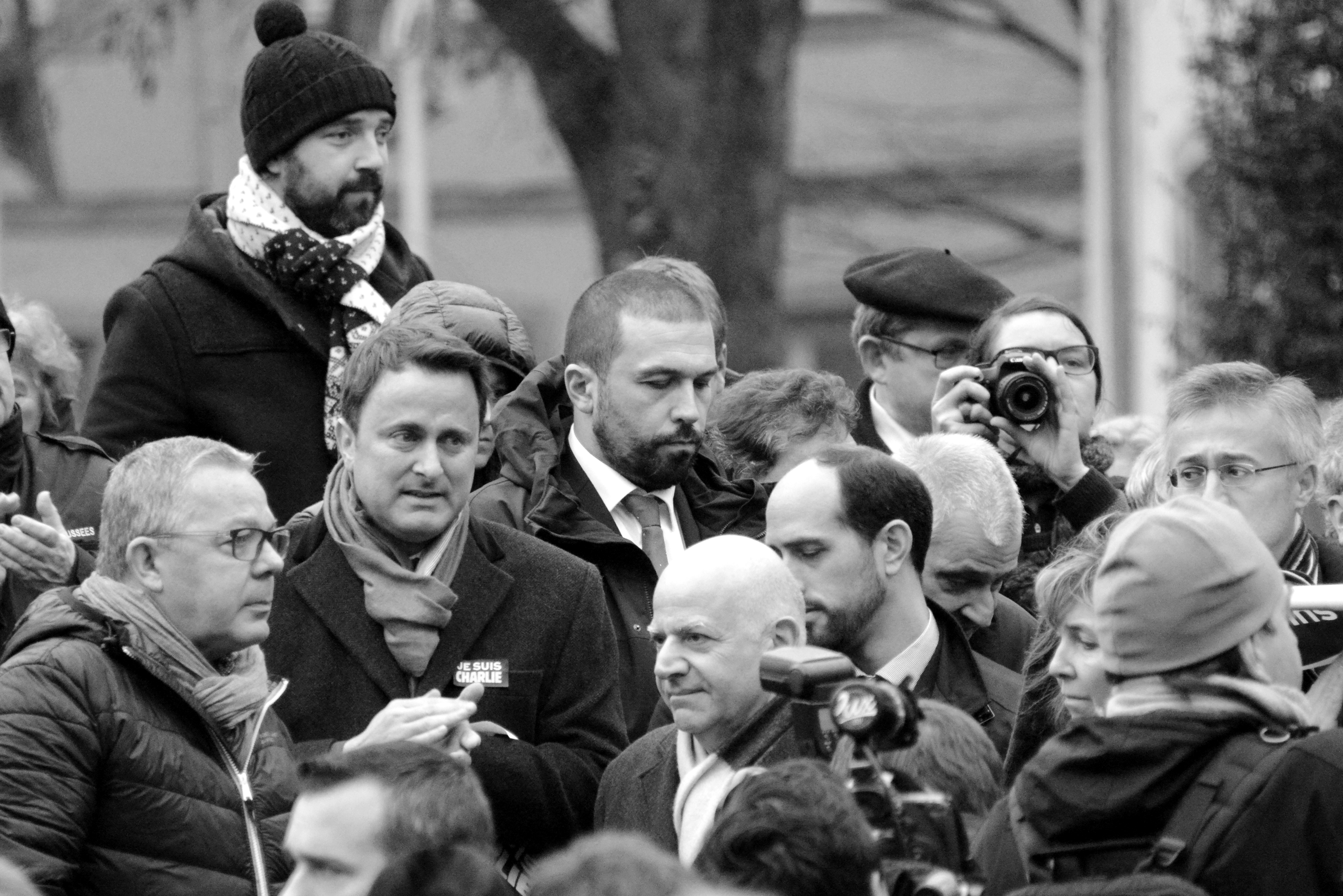 Nom Iwwerfall op d'Redaktioun vun Charlie Hebdo de 7. Januar 2015, gouf et den Dag drop eng Solidaritéitsmanifestatioun op der Clairefontaine-Plaz an der Stad Lëtzebuerg mat enger Gedenkminutt fir d'Affer vun deem Terrorakt.Eng 500 Leit aus der politescher an der ziviler Gesellschaft waren zesumme komm fir géint dëse Crime ze protestéieren an den Affer eng lescht Éier ze erweisen.No der Usprooch vum Journalist Roger Infalt, dem President vom Conseil de Presse.